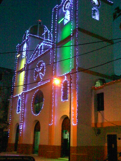 Iglesia San José; madrugada del 24 de diciembre.